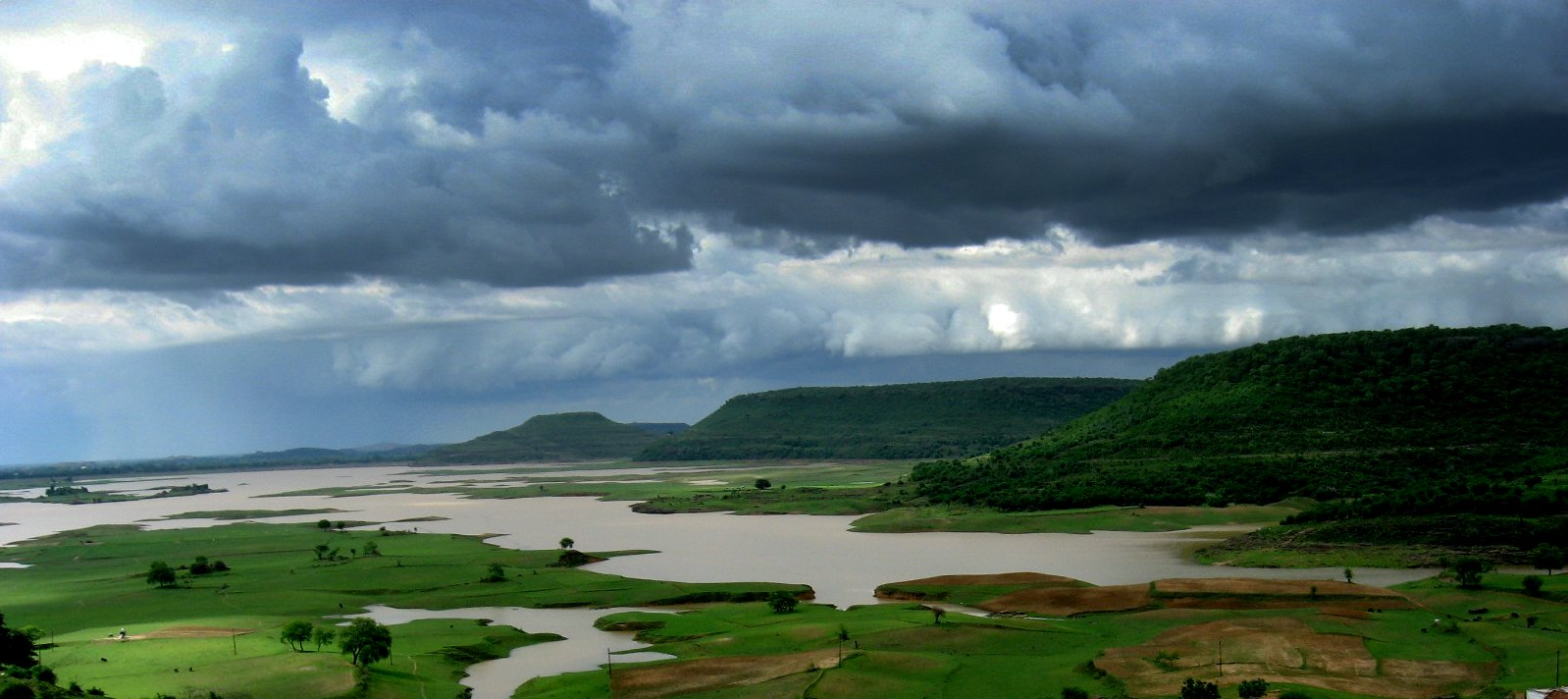 ഗംഗനദി.